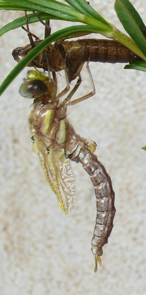 Aeshna juncea